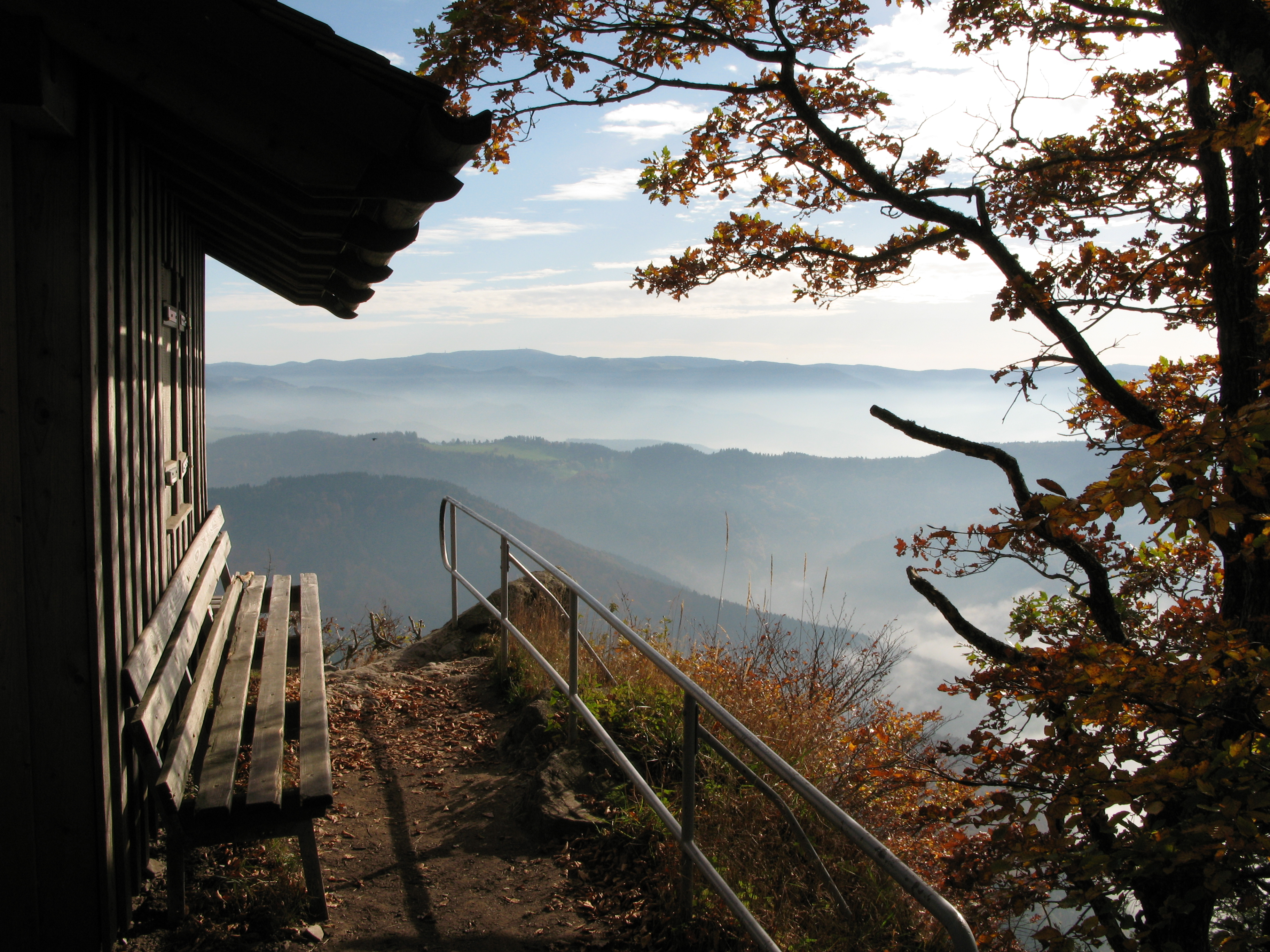 Blick von der Thomashütte auf den Feldberg. Die Hütte liegt oberhalb des kleinen Kandelfelsens und unterhalb des Kandels am Zweitälersteig im Schwarzwald.